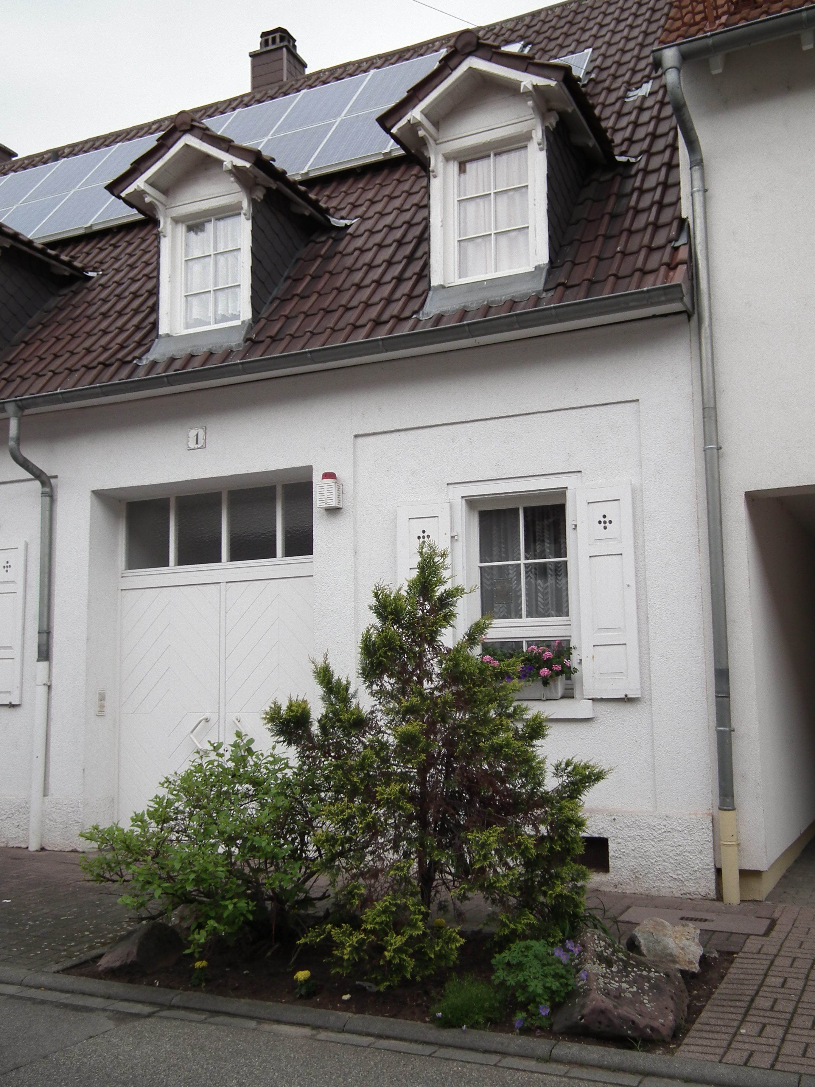 Wohnhaus in Schwetzingen (Rhein-Neckar-Kreis, Baden-Württemberg, Deutschland)